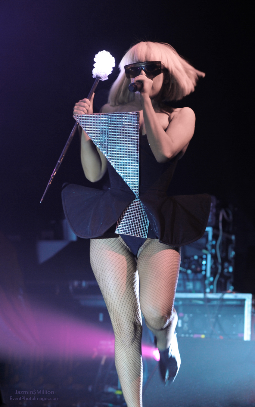 Lady Gaga at Montreal concert.